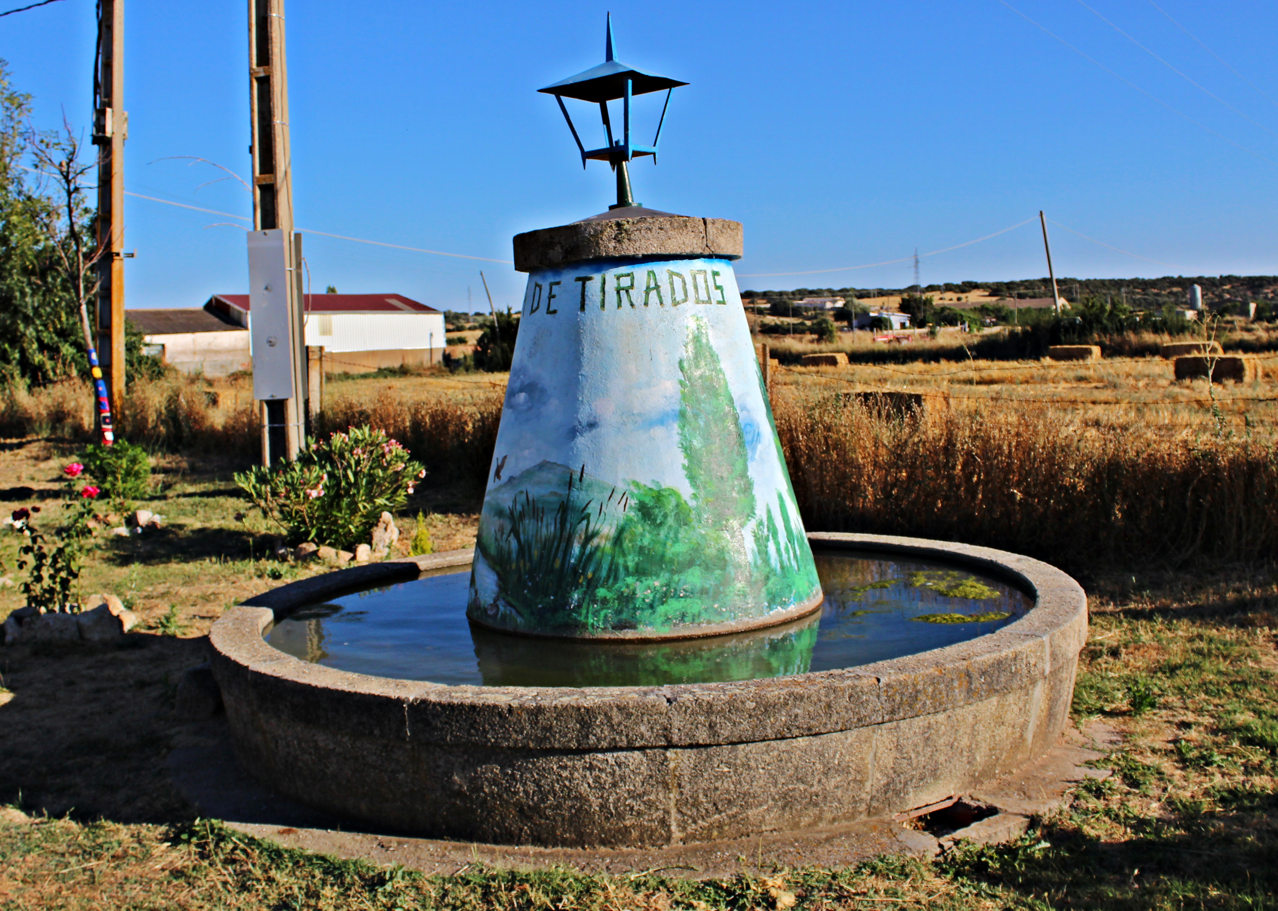 Vega de Tirados, provincia de Salamanca